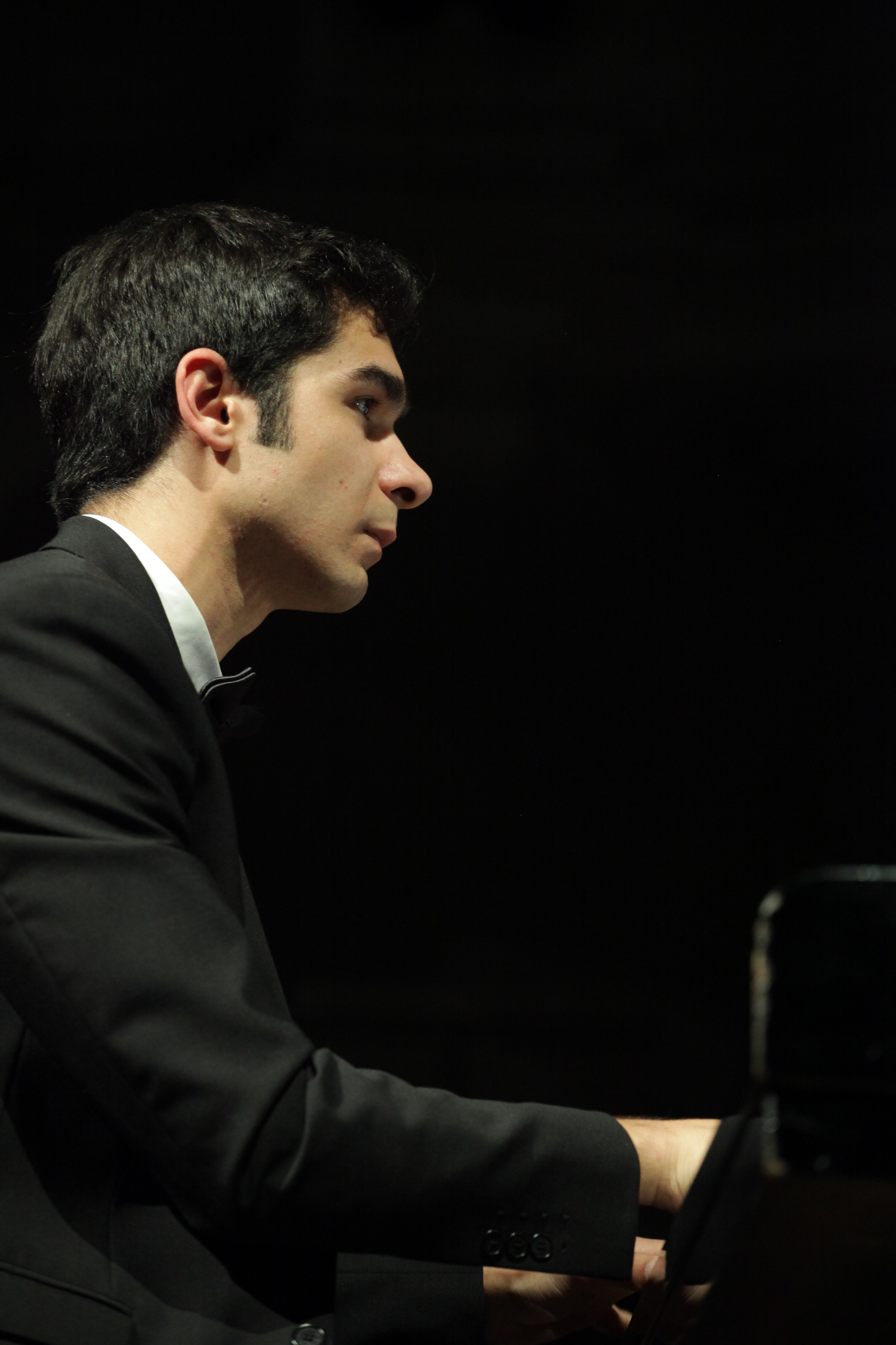 Nikita Ramic à la Salle Gaveau en 2018.